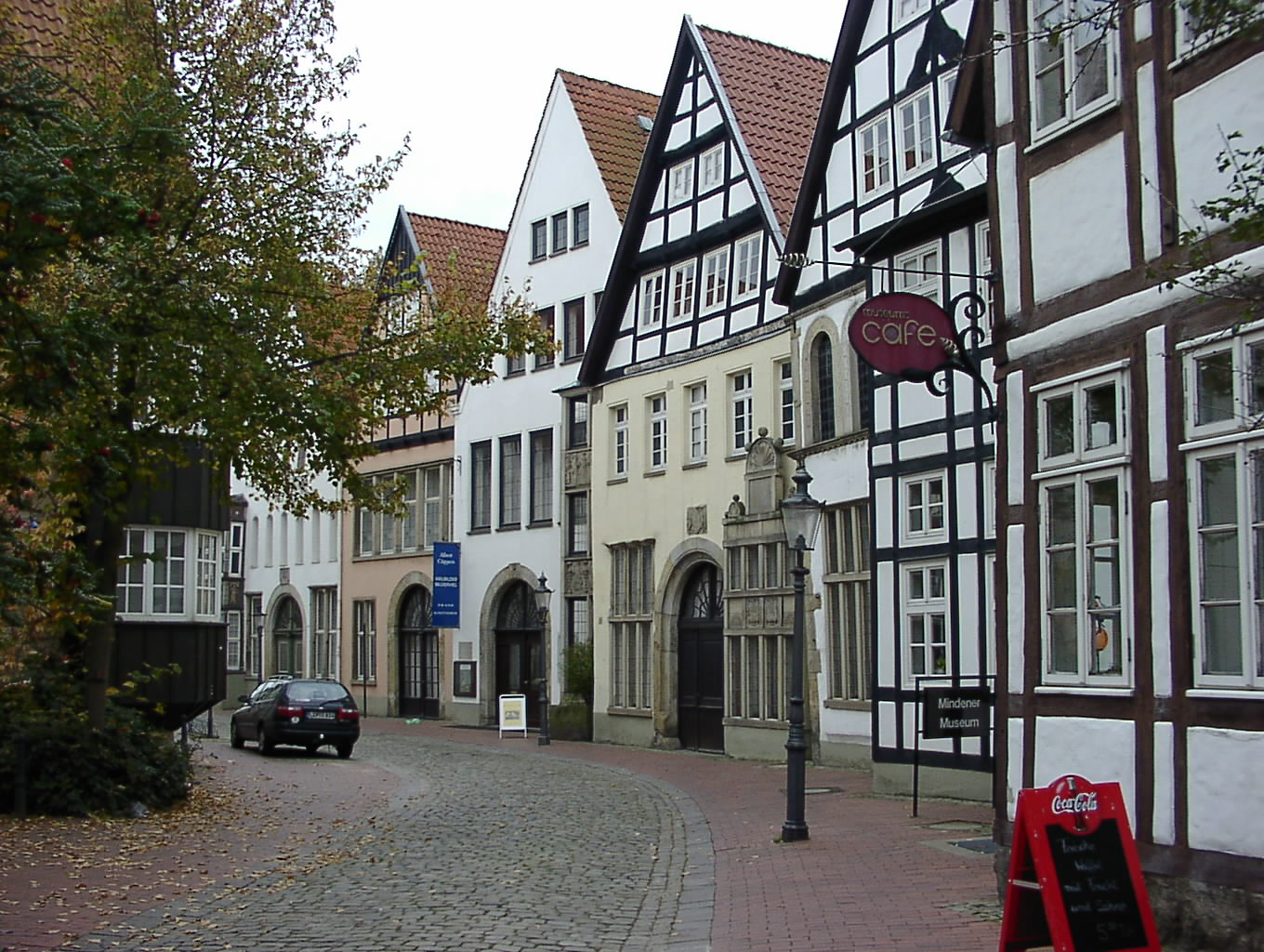 Die Museumszeile in Minden, Nordrhein-Westfalen. Einige Gebäude sind im Stil der Weserrenaissance ausgeführt. In der Ritterstraße sind ein Puppenmuesum und das Mindener Museum zur Kulturgeschichte von Stadt und Region Minden beheimatet.